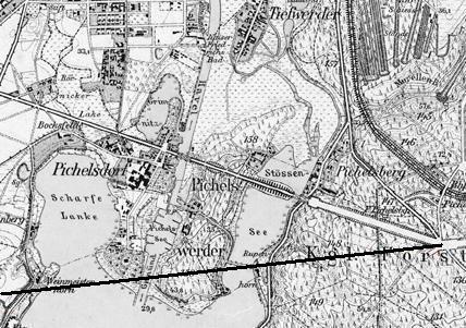 Realisierter Verlauf der Heerstraße durch die Berliner Havelniederung mit der Stössenseebrücke und Freybrücke auf einer Karte von 1901 (oberer Straßenzug, mit nordwestlichem Knick am Scholzplatz). Die von mir eingezeichnete untere schwarze Linie zeigt die Entwurfslinie der Straße bei schnurgerader Weiterführung ohne Knick am Scholzplatz, die eine zusätzliche Überbrückung der Scharfen Lanke erfordert hätte. Die Einzeichnung erfolgte gemäß: Abb. 1 Übersichtsplan für die Entwurfslinien. In: Karl Bernhard: Stößensee- und Havelbrücke im Zuge der Döberitzer Heerstraße. In: Zeitschrift für Bauwesen 61, 1911, S. 322. Der Bauingenieur Karl Bernhard hat im gleichen Artikel vier Brückenvarianten zur nichtrealisierten Straßenführung ohne Knick skizziert: 1a) Überbrückung der Havel und der Scharfen Lanke in einem Brückenzug ohne Damm 1b) Überbrückung des Stößensees ohne Damm, westlicher Ausgangspunkt: Rupenhorn Gesamtkosten bür 1a) und 1b): 16,9 Millionen Mark 2a) Überbrückung der Havel und der Scharfen Lanke mit zwei Brücken und Dammaufschüttung auf dem Pichelswerder 2b) Überbrückung des Stößensees mit Dammaufschüttung im See Gesamtkosten bür 2a) und 2b): 11,2 Millionen Mark Wegen der hohen Kosten und der zu starken Beeinträchtigung des Landschaftsbilds bei den vorstehenden Lösungen wurde die Heerstraße am Scholzplatz geknickt, womit die Scharfe Lanke nicht mehr berührt wurde. Realisiert wurden die Freybrücke üder die Havel und die Stößenseebrücke über den See, wobei im Stößensee der eingezeichnete Damm aufgeschüttet wurde. Die Gesamtkosten für diese realisierte Lösung lagen bei 2,54 Millionen Mark. (Quellen: Artikel Karl Bernhard, S. 322ff.)